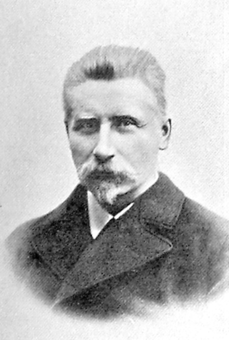 Viggo Lauritz Bentheim Hørup (22. maj 1841 - 15. februar 1902) dansk jurist, politiker, redaktør og minister. Viggo Hørup